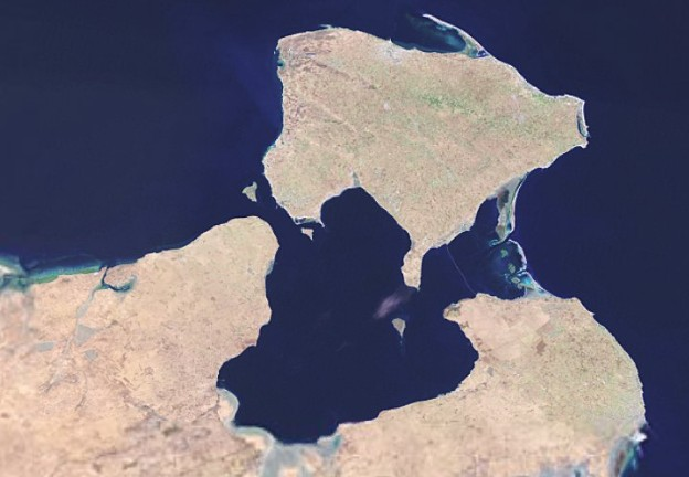 Satellite image of Djerba, Guetaïa el Gueblia, Guetaïet el Baharia, Jeliji, Boughrara (Tunisia)